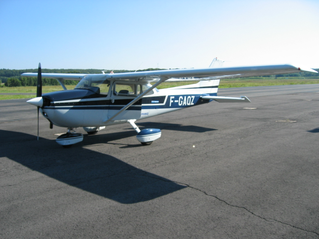 Cessna 172